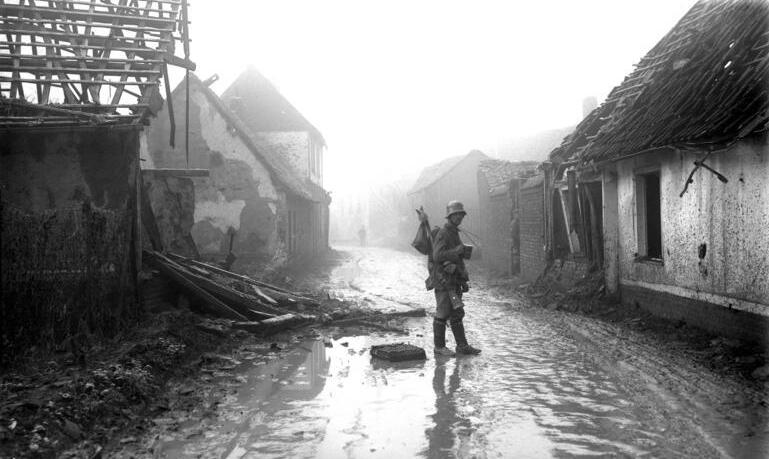 I. Weltkrieg 1914-1918 Etricourt, Strassenbild mit Kirche